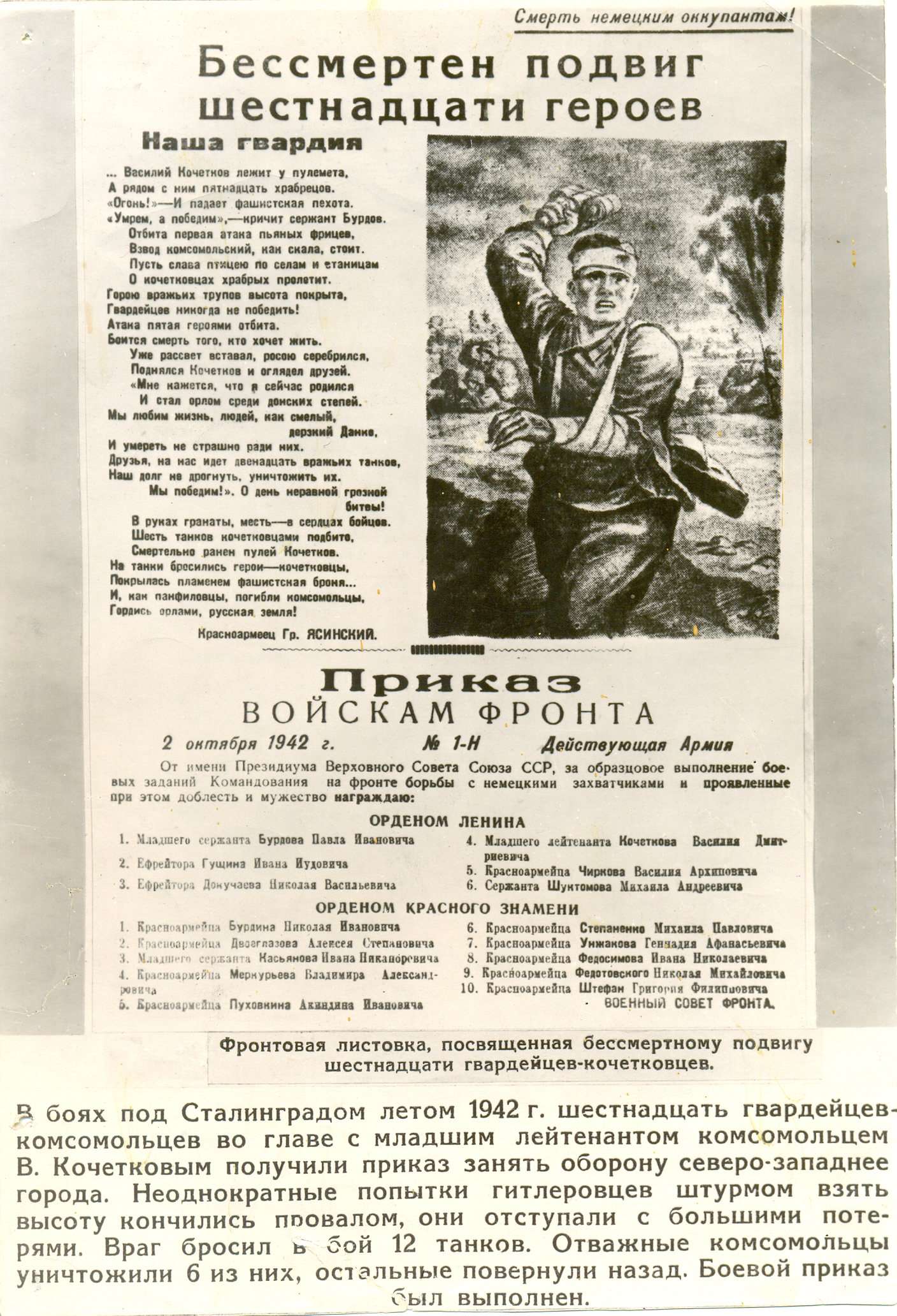 Фронтовая листовка посвящённая подвигу В.Д. Кочеткову и его подчинённым. Листовка издана в 1942 году во время Сталинградской битвы.